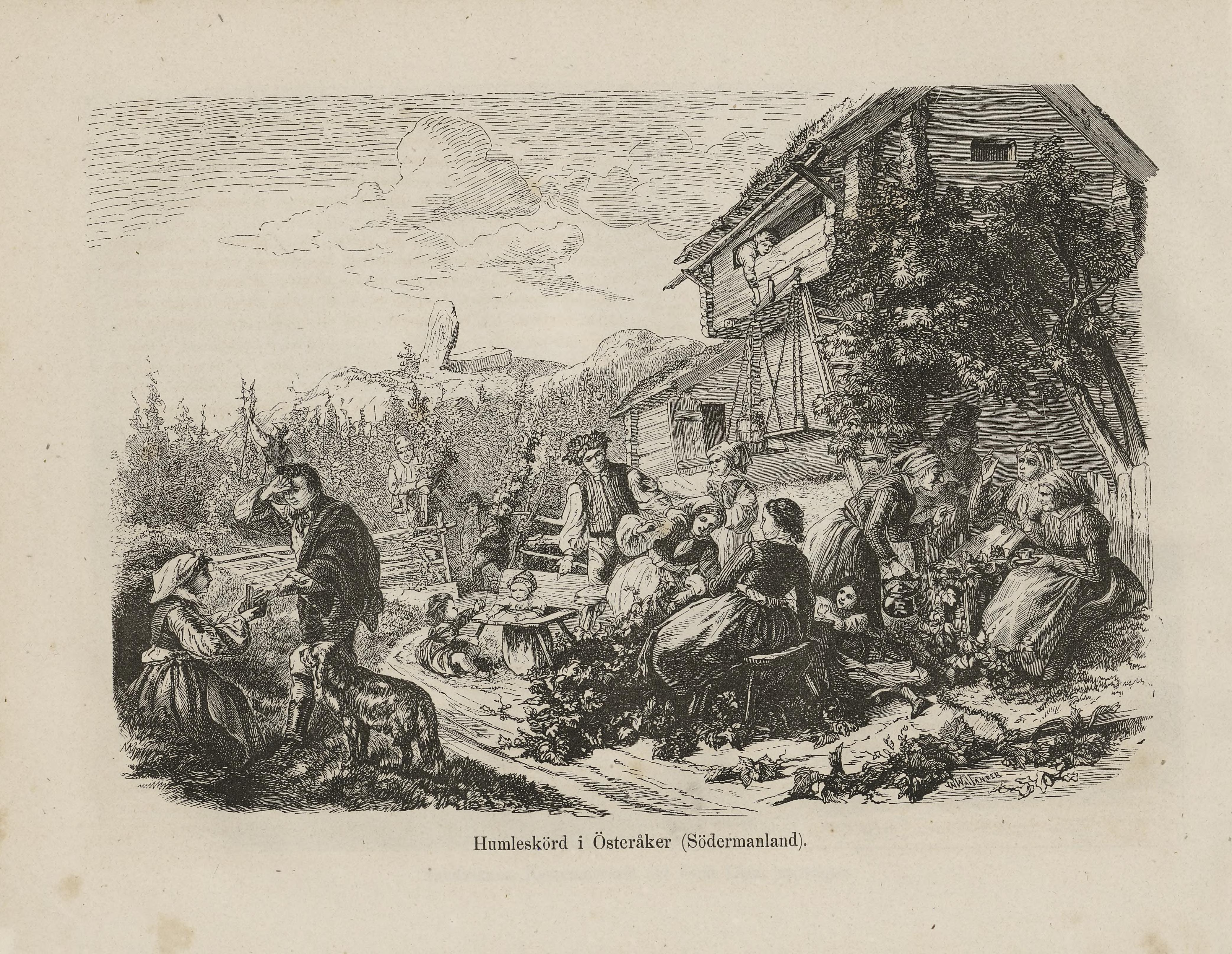 Illustrasjon hentet fra boken Nordiska taflor av ukjent forfatter og utgitt av Albert Bonnier (se, 1875)